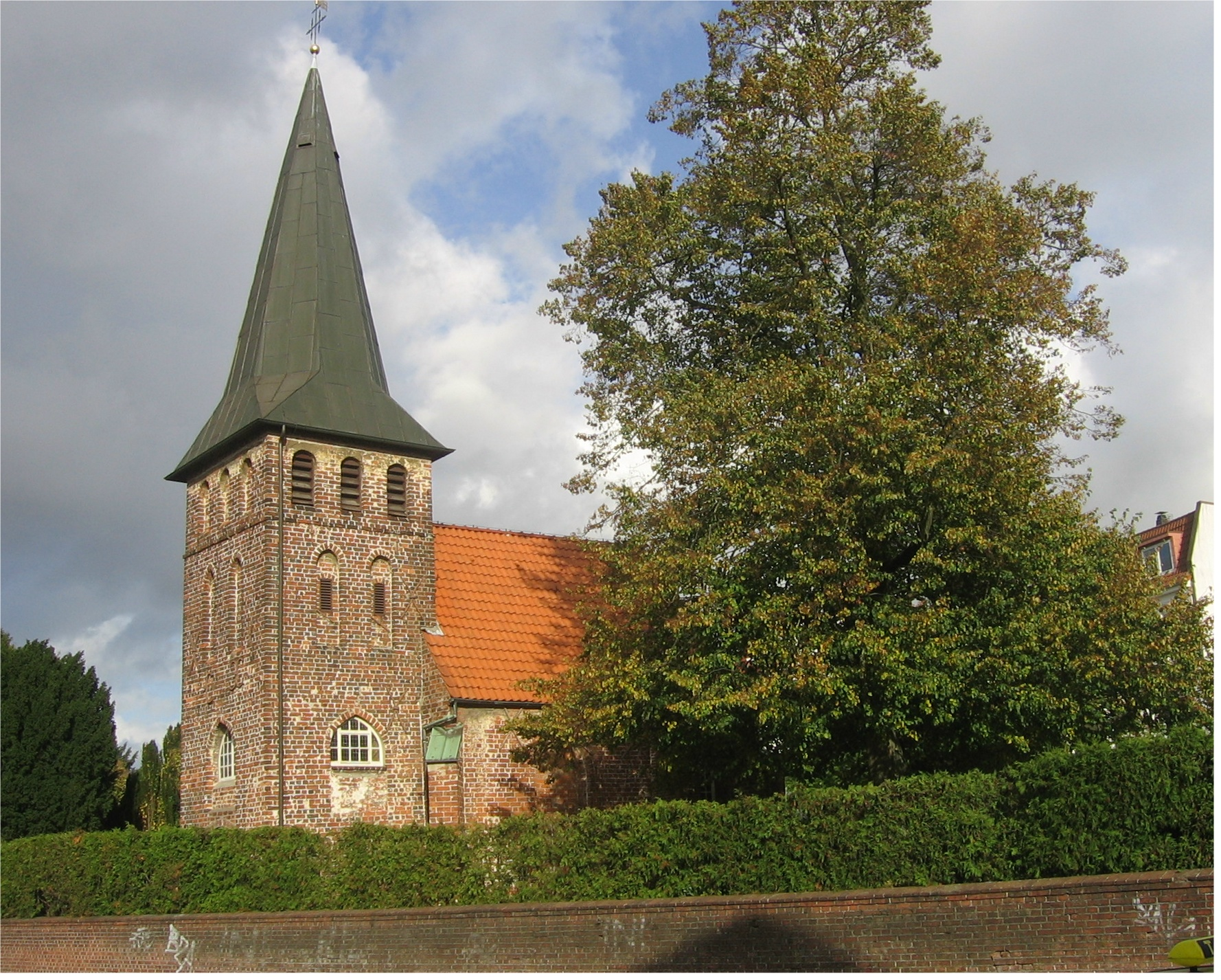 Gertrudenkapell in Ollnborg